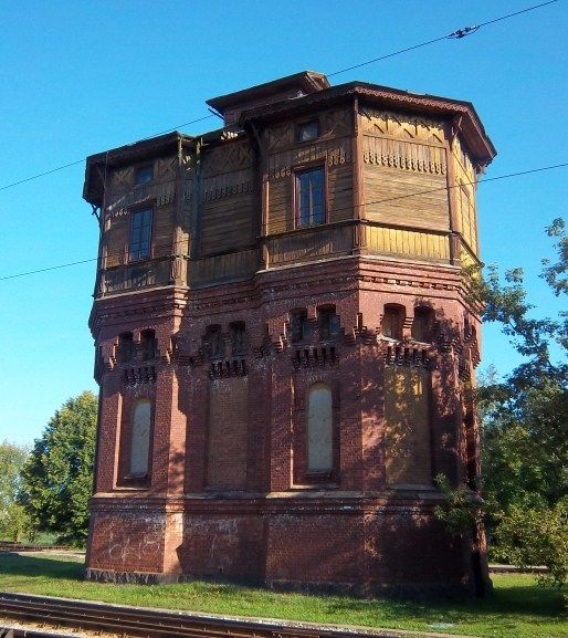 Kaišiadorių vandens bokštas